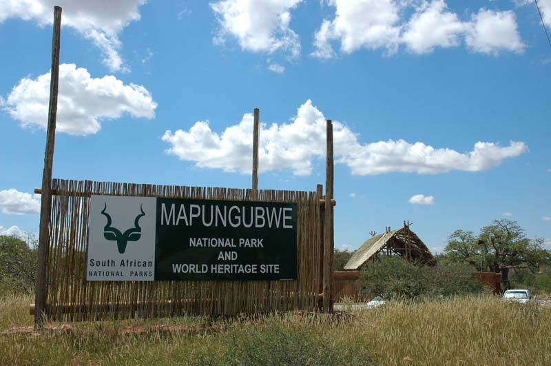 Mapungubwe National Park